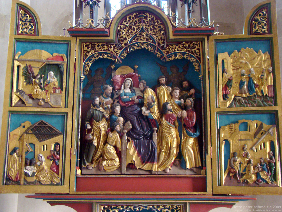 Hochaltar der Stadtkirche Schwaigern